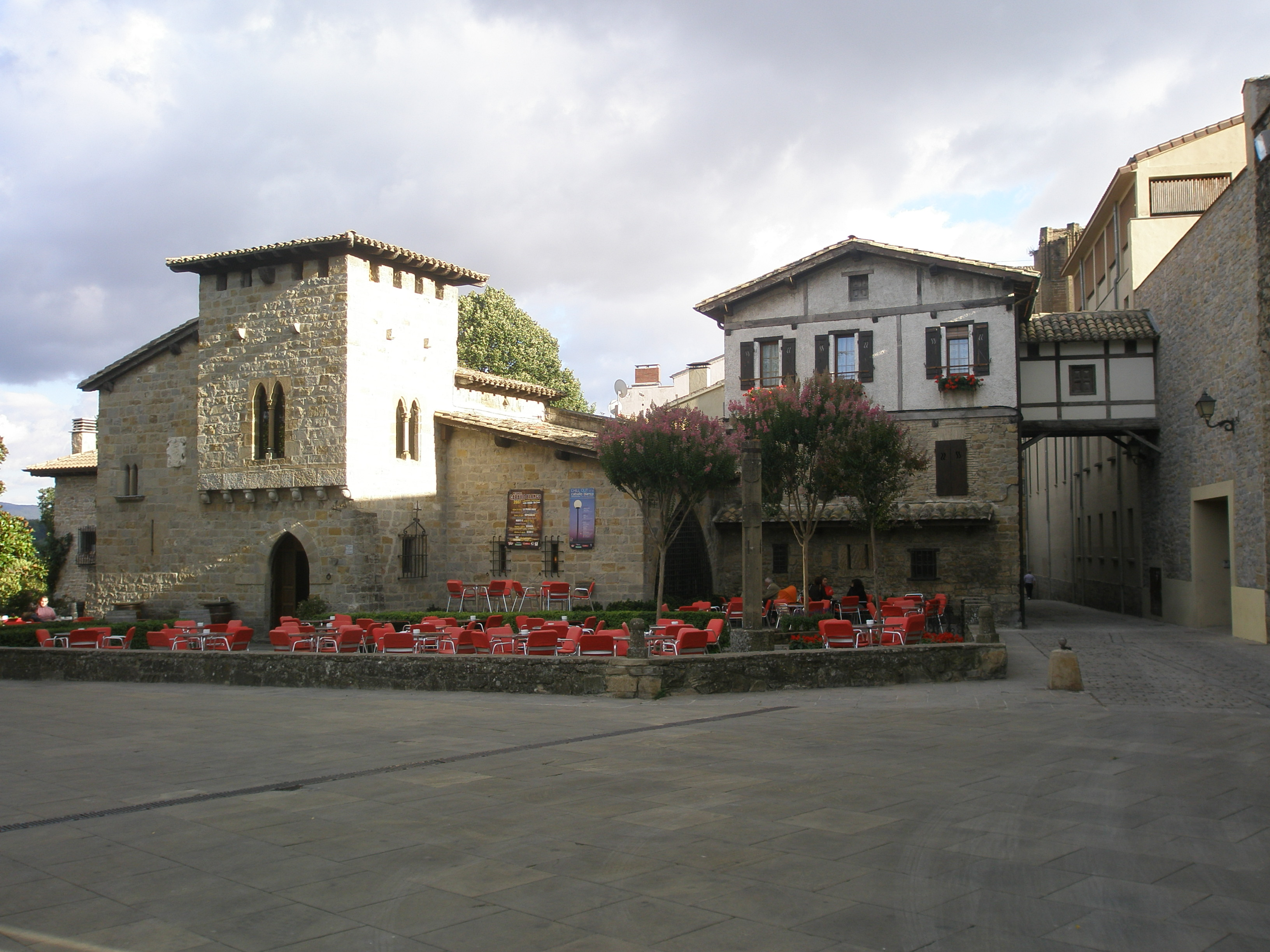 Agradable rincón pamplonés, también llamado el Redín. Con una magnífica panorámica de la Rochapea desde la muralla.